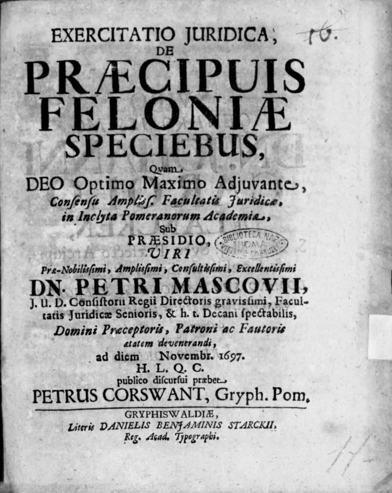 Frontespizio